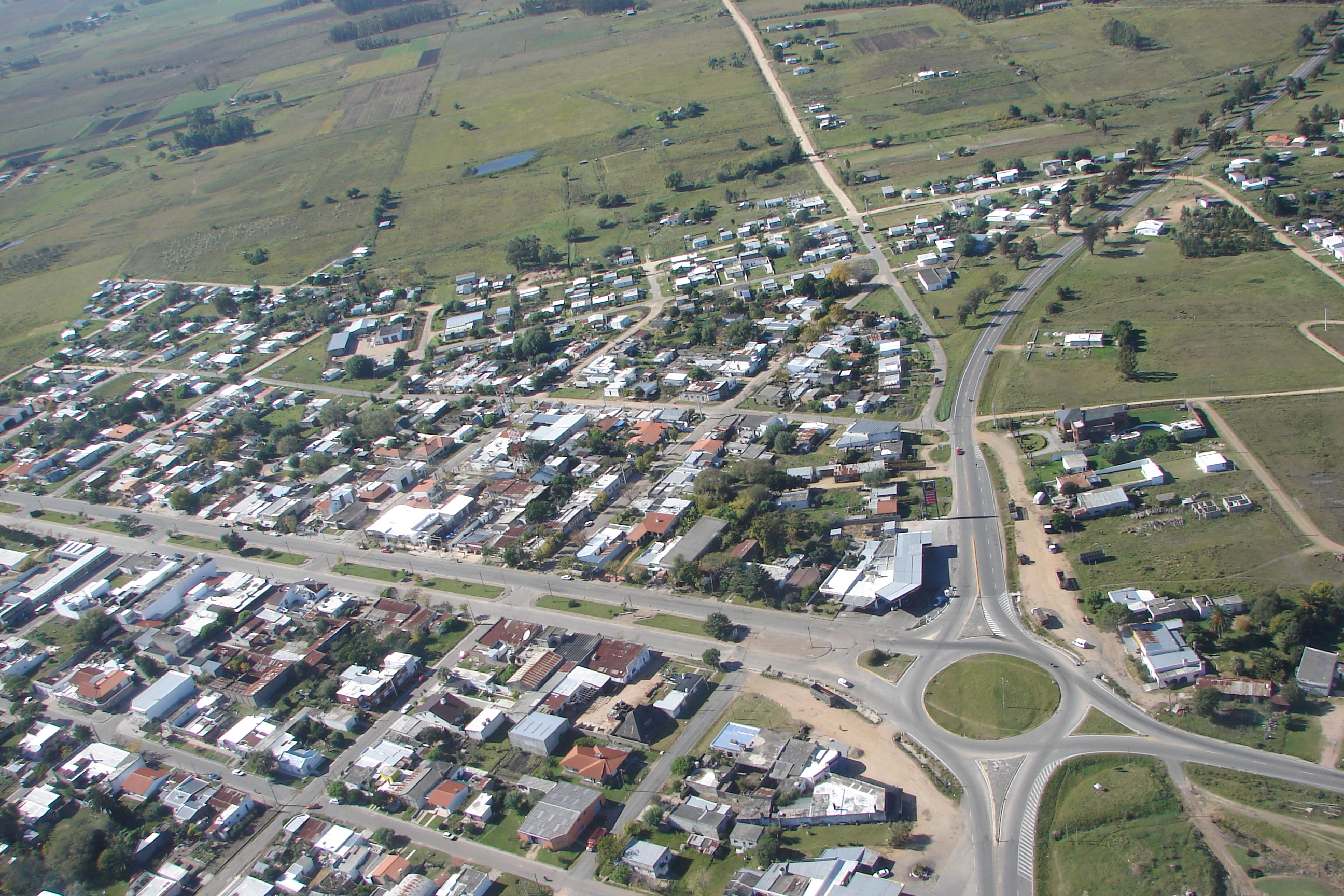 Vista aerea del cruce de las rutas 7, 11 y de parte de la ciudad de San Jacinto en el departamento de Canelones en Uruguay.